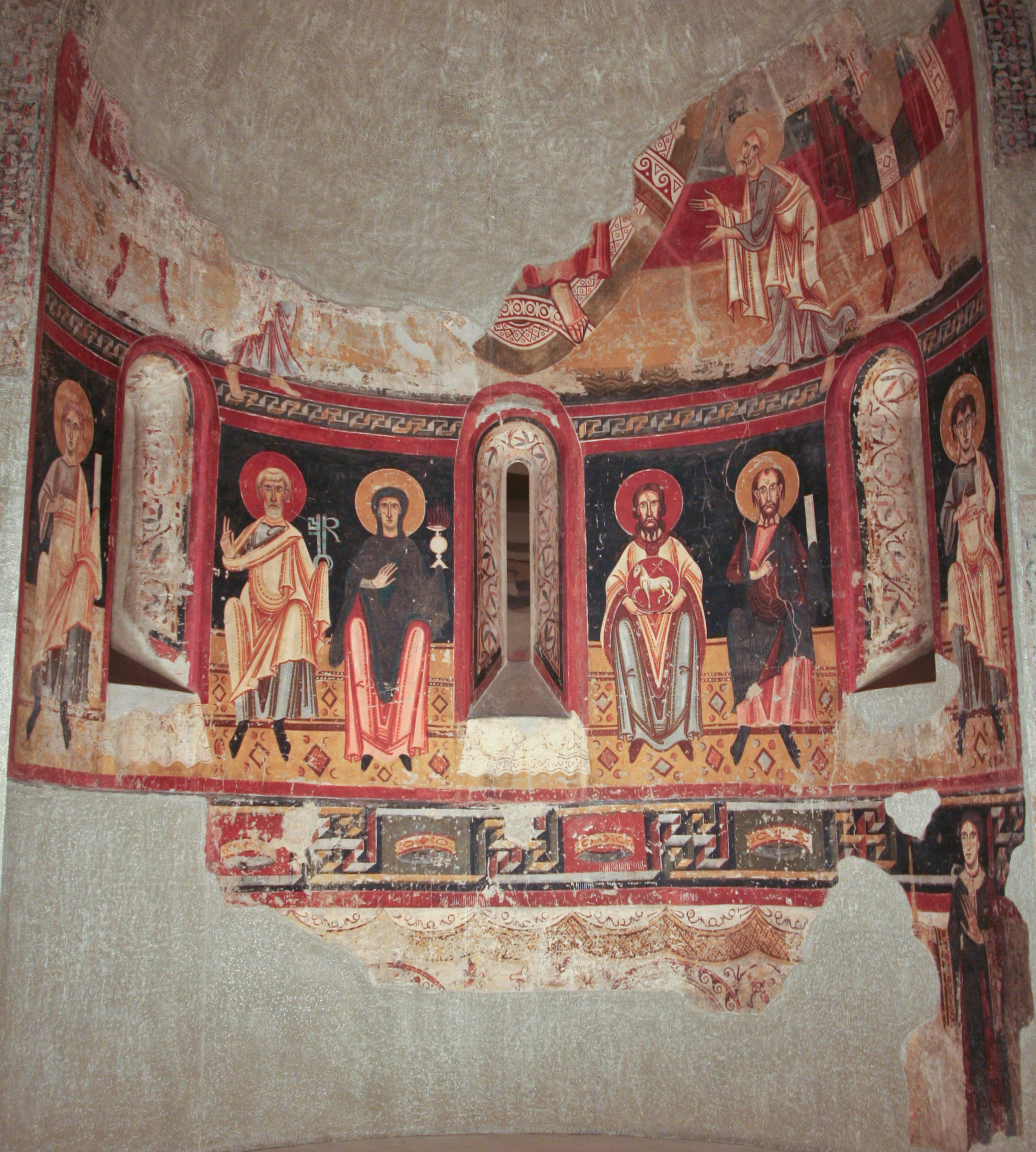 Absis de Sant Pere del Burgal, 11th c. fresco (Escaló, la Guingueta d'Àneu (Pallars Sobirà, Catalunya) L'original està al MNAC (Barcelona) Object location42° 32′ 45.56″ N, 1° 10′ 02.01″ E